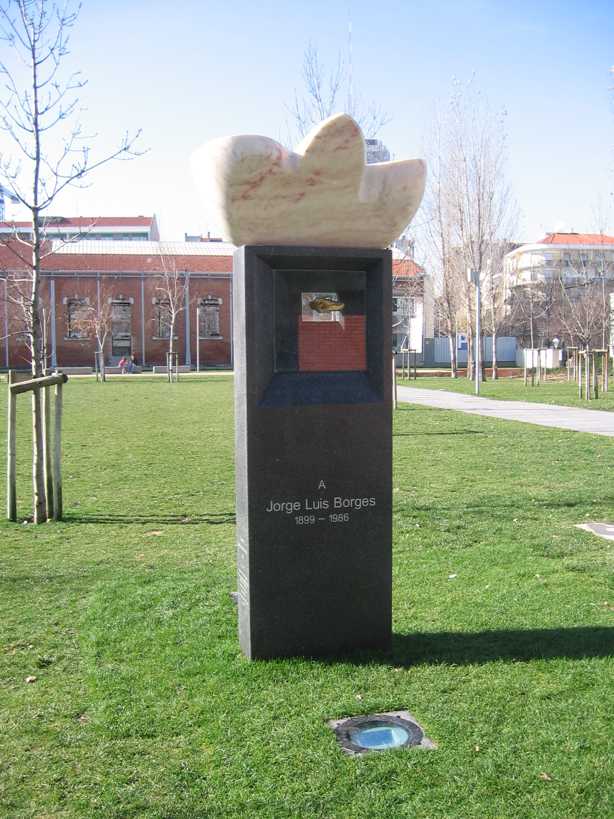 Monumento em Lisboa a Jorge Luis Borges, escritor luso-argentino